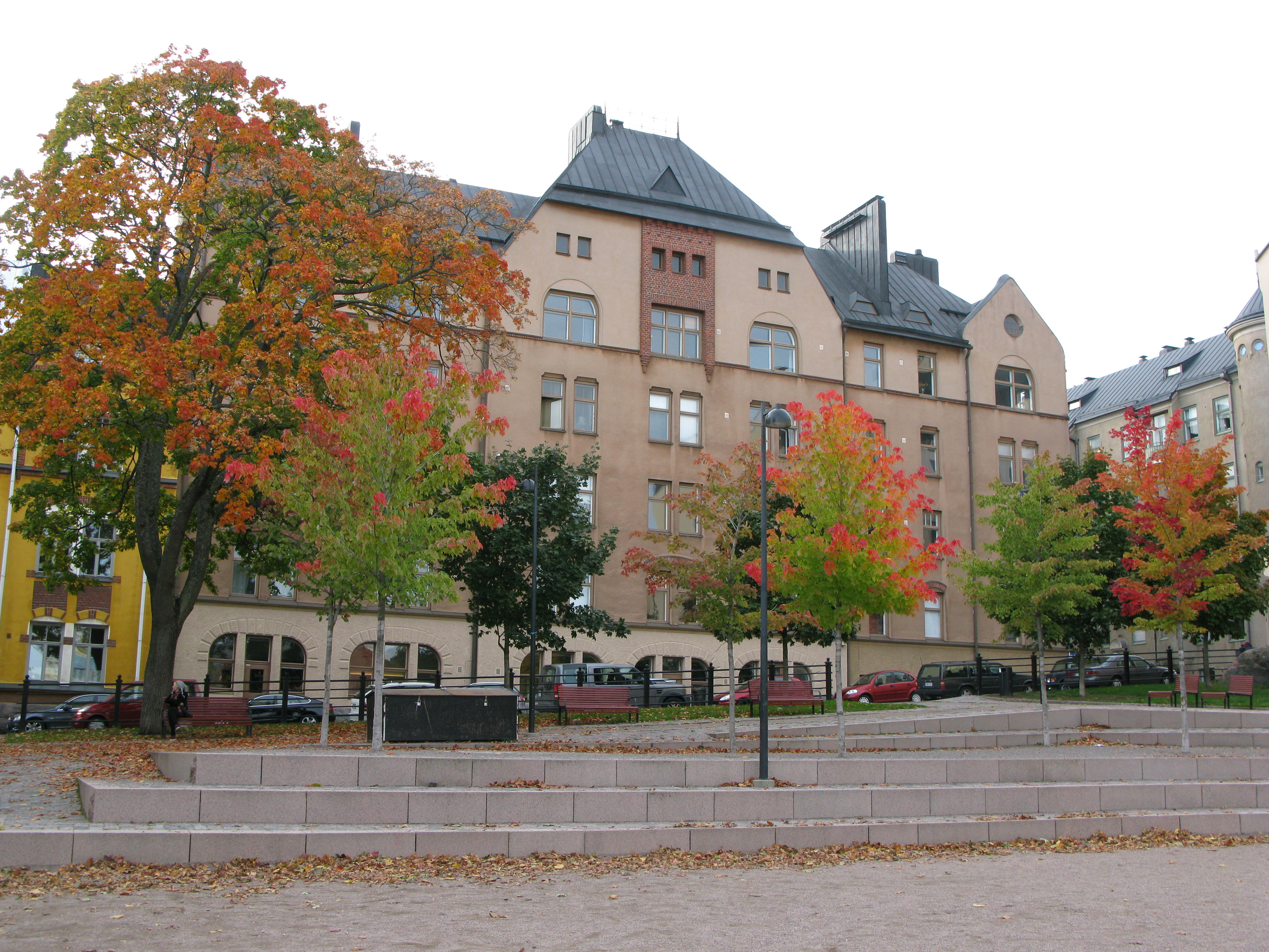 Koiton talo Luotsi- ja Vyökatujen kulmassa